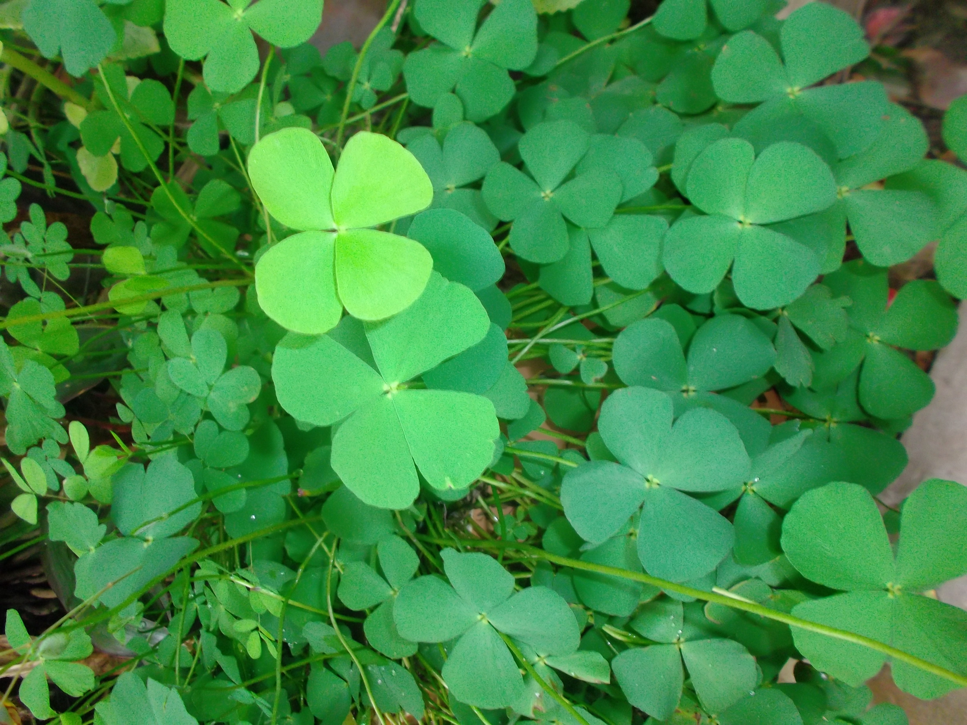 Vista de uma espécie de Trevo-de-quatro-folhas.